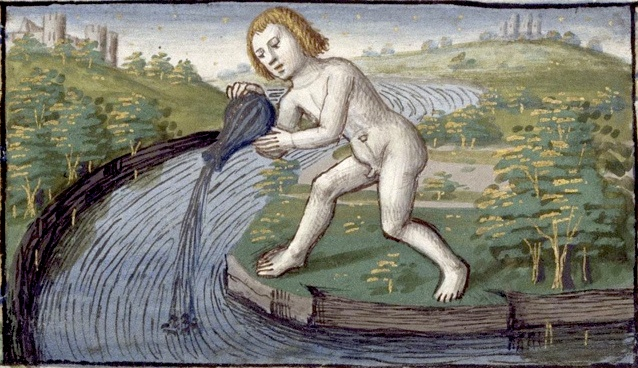 Heures de Charles VIII Calendrier-Janvier (zodiaque)